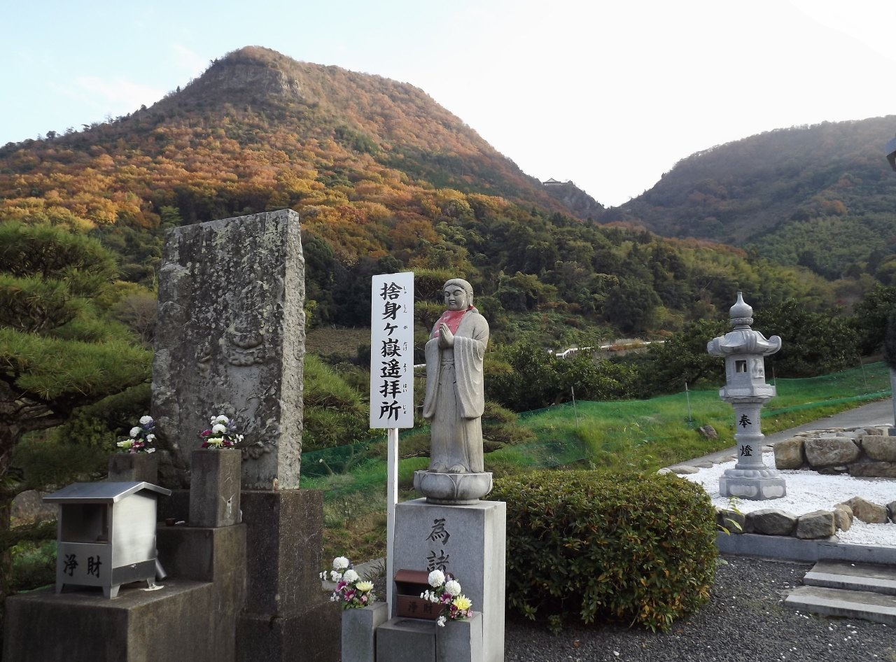 出釈迦寺の奥の院遥拝所